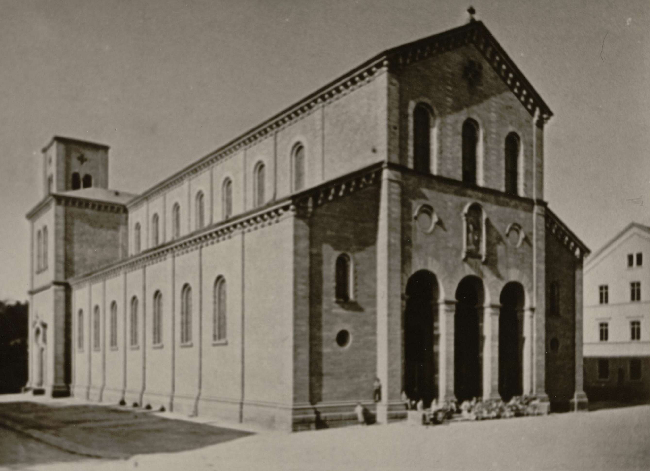 Ludwigshafen, kath. Pfarrkirche St. Ludwig, Vorkriegszustand